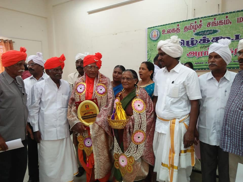 மதுரை உலகத்தமிழ்ச் சங்கம், மெய்வழி இளம்கலைக்கோட்டு அனந்தருக்கு, 'செம்மொழித் தமிழ் சிற்றிலக்கிய வேந்தர்' என்னும் பட்டமும் பதக்கமும் வழங்கிய நிகழ்வு